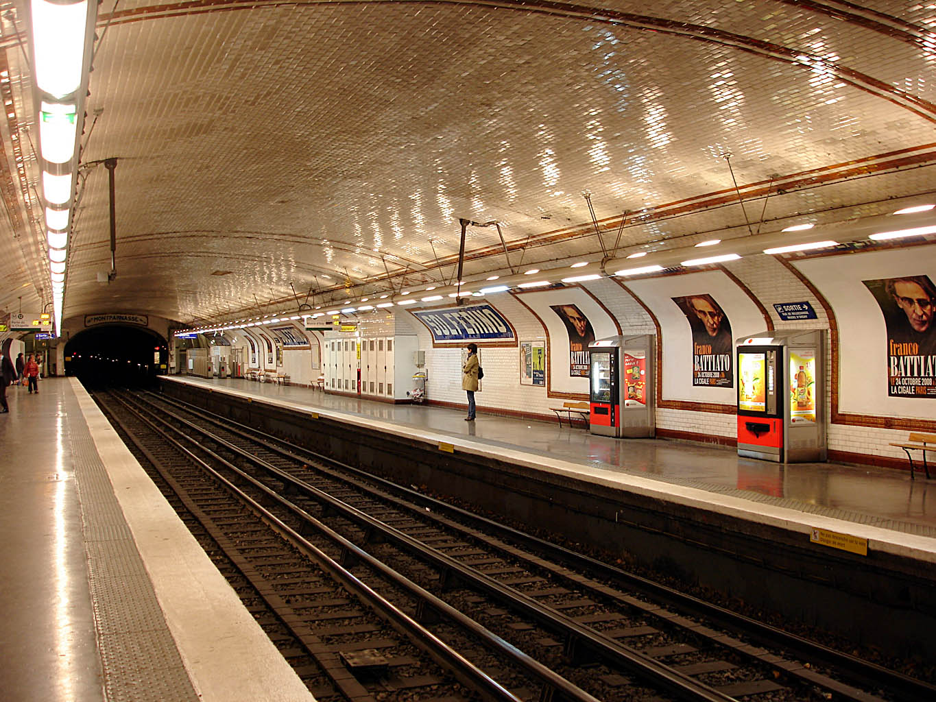 Station Solférino de la ligne 12 du métro de Paris, France.